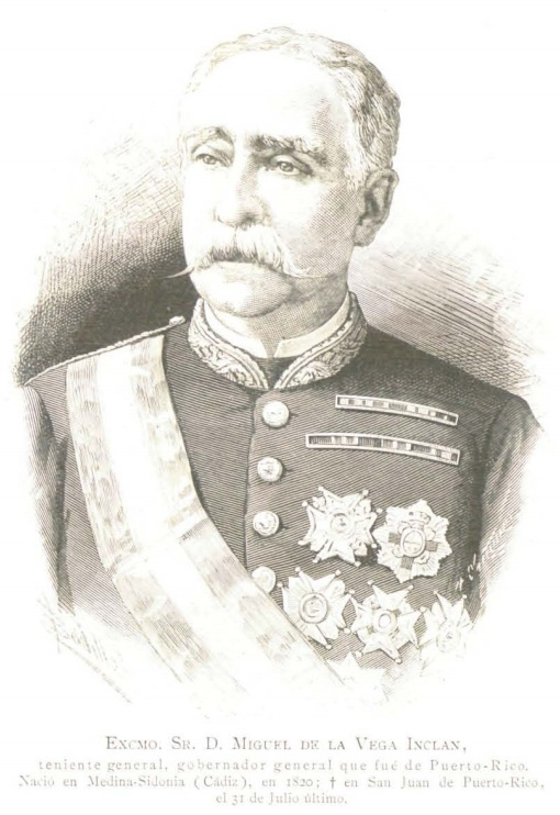 Excmo. sr. D. Miguel de la Vega Inclán, teniente general, gobernador general que fué de Puerto-Rico. Nació en Medina-Sidonia (Cádiz), en 1820, falleció en San Juan de Puerto-Rico, el 31 de julio último.